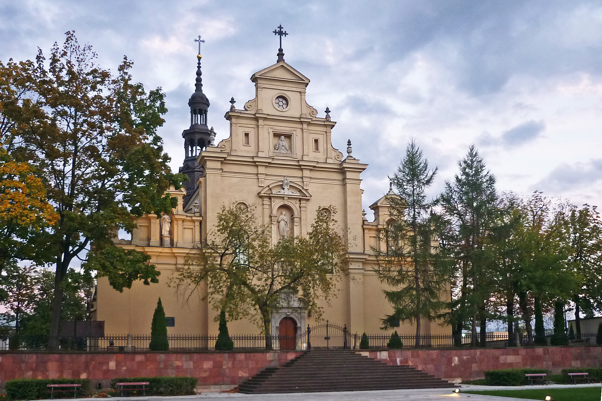 Kathedrale von Kielce in Polen